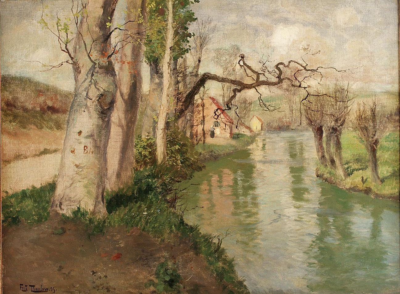 картина Ф.Таулова (1847-1906) «(Пейзаж) Із Діппа з річкою Аргез» (Fra Dieppe med elven Arques), 1895